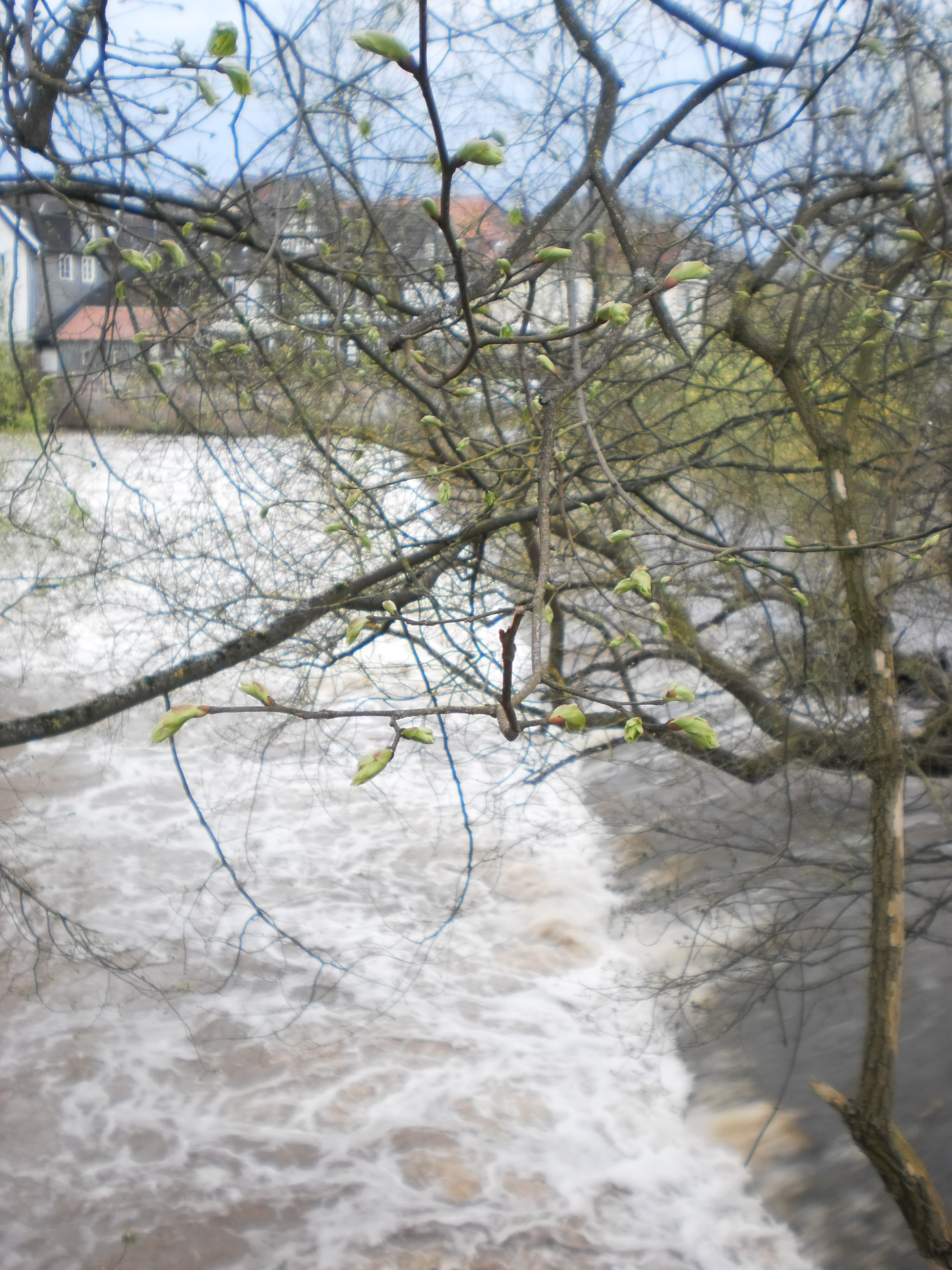 Frisches zartes Lindgrün, Knospen bei Blattaustrieb am Grüner-Wehr, tiefhängende Äste einer Linde am Lindenallee-Ufer in Marburg-Weidenhausen. Auf der gegenüberliegenden Lahnseite steht die Grüner Mühle am Wehr, das zum Zeitpunkt der Aufnahme nach Gewitterregen etwas mehr Wasser der Lahn als gewöhnlich überspült (14. April 2018).